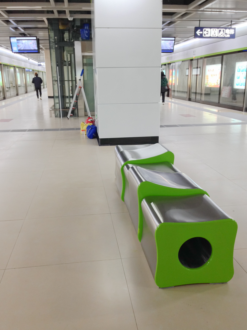 中文（中国大陆）: 武汉地铁4号线东亭站的座椅